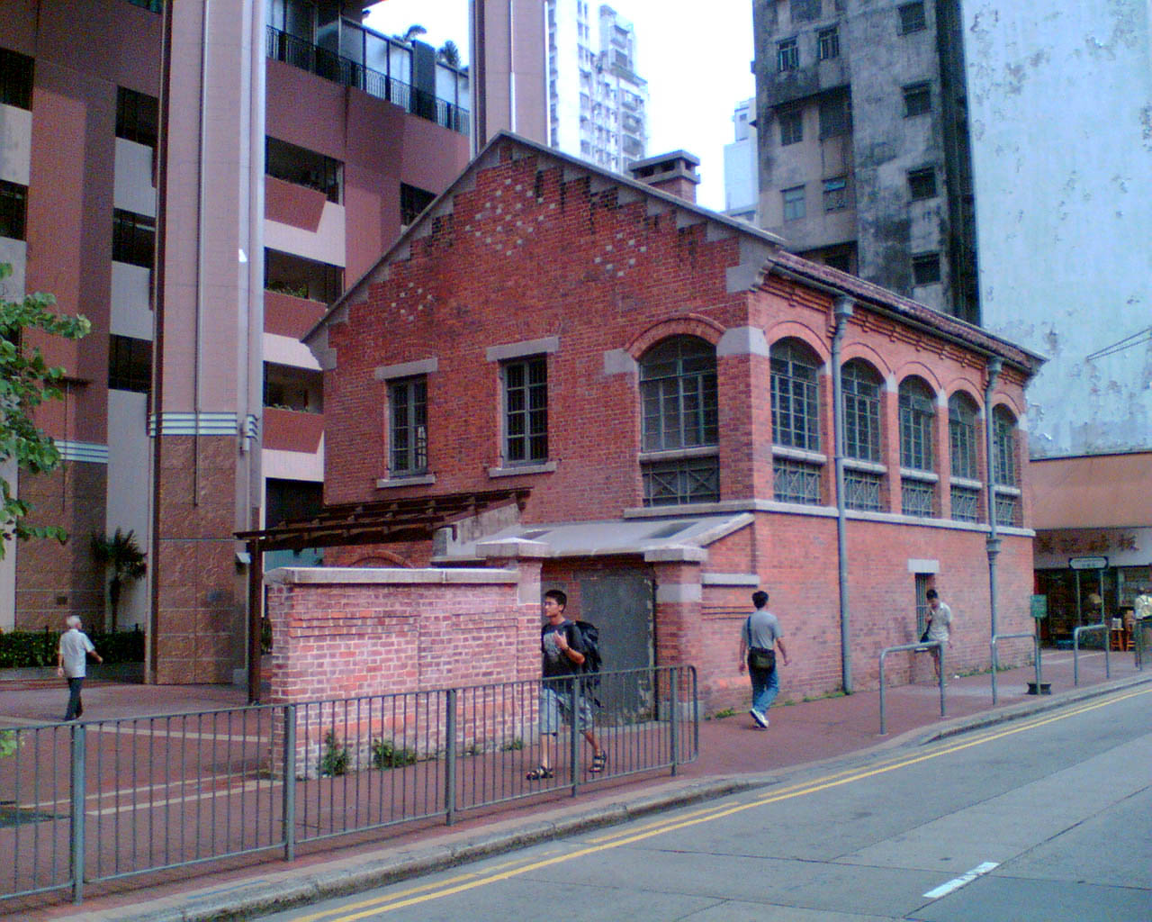 紅磚屋左面